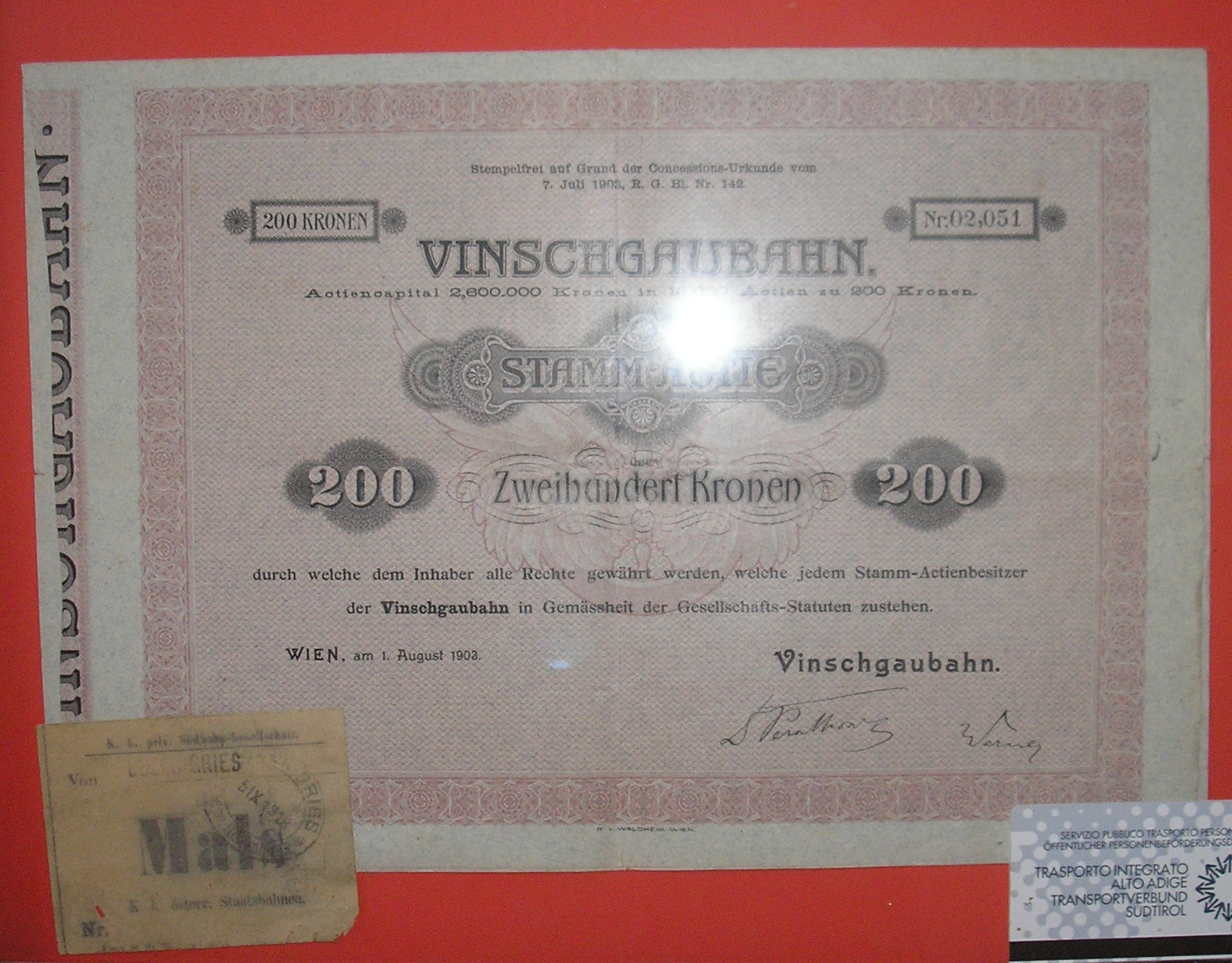 Historische Aktie der Vinschgaubahn von 1903